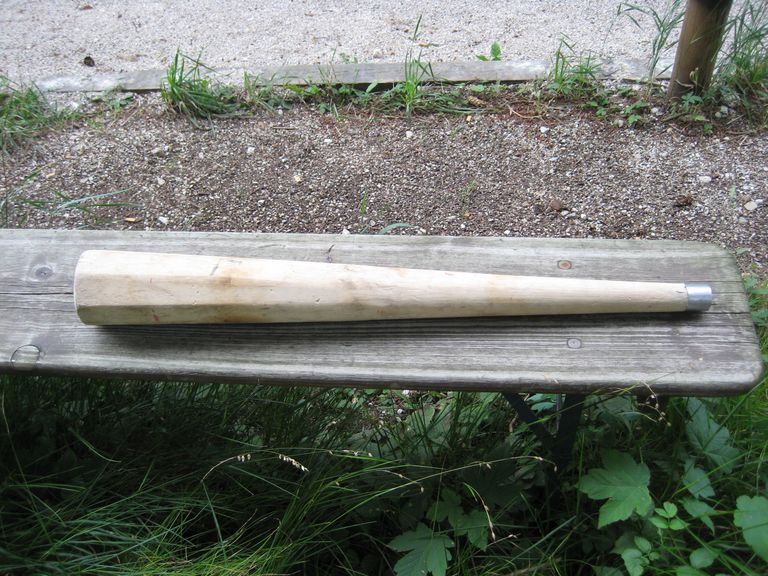 Ein Knittel.